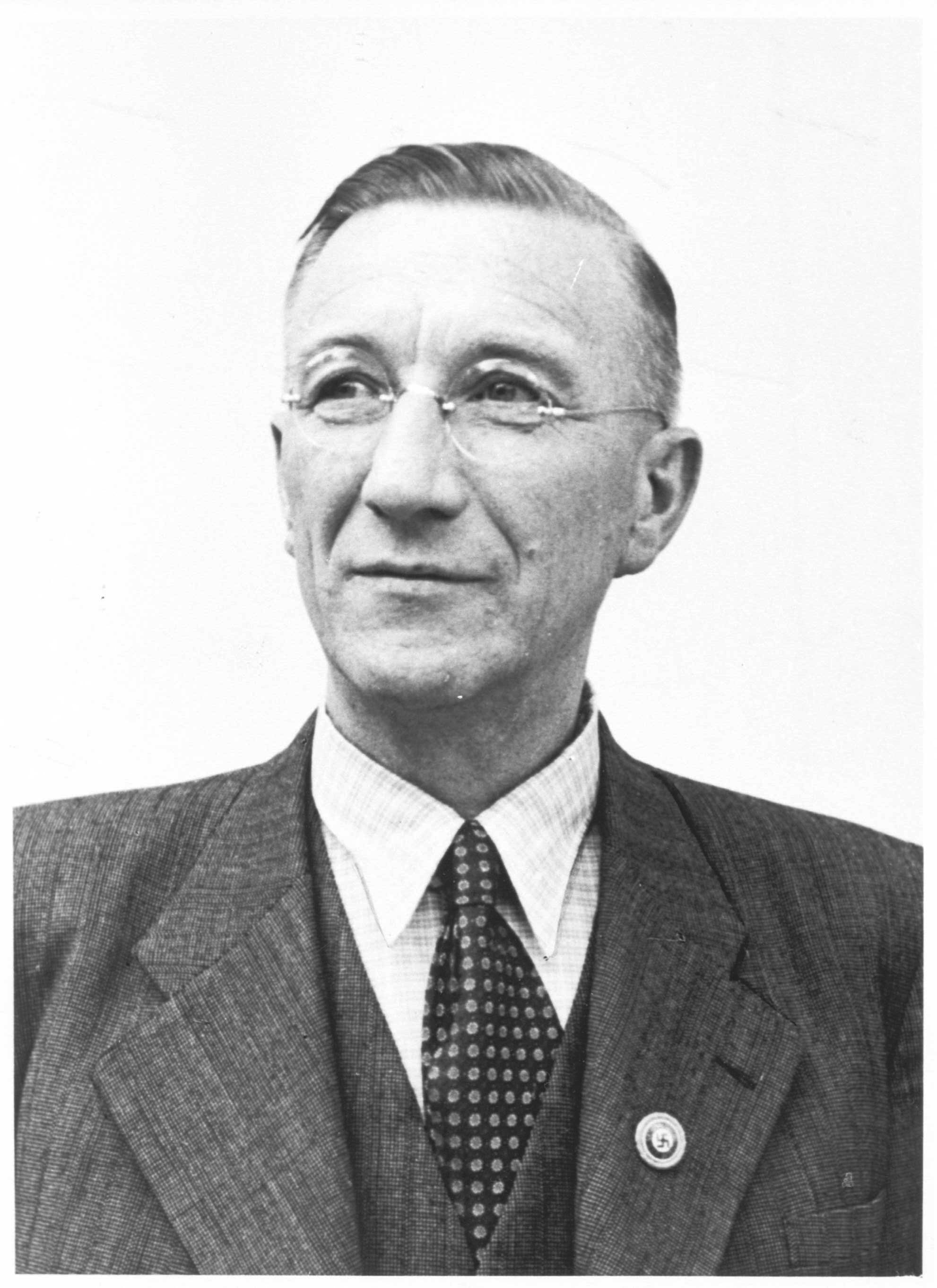 Wilhelm Friedrich Adolf (Willi) Ritterbusch (Werdau, 3. Juli 1892 – 10. April 1981), Gauleiter NSDAP, 1933 Kreisleiter in Mersebur, in 1940/1941 Beauftragte des Reichskommissars für die besetzten Niederlande für die Provinz Nordbrabant, 1941/1943 Leiter der Abteilung II B in der Parteikanzlei der NSDAP, 1943/1945 Generalkommissar zur besonderen Verwendung in den Niederlanden.